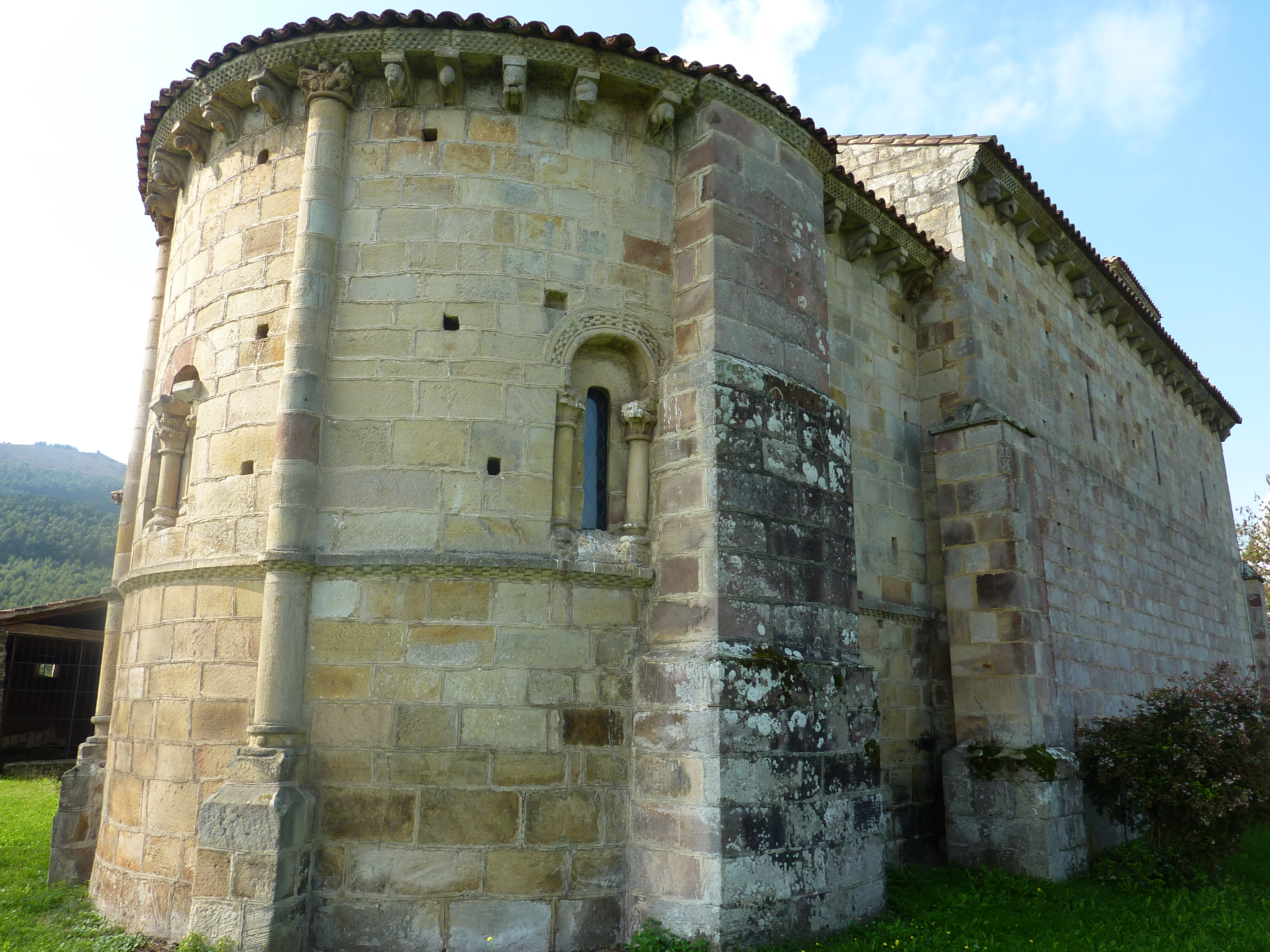 Iglesia de San Andres Argomilla. Santa Maria De Cayon